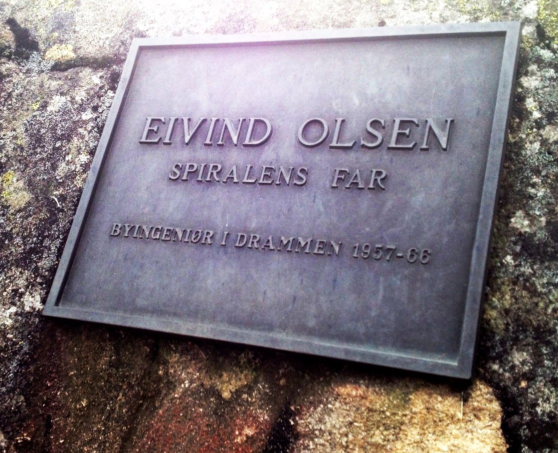 Plakett for Einar Olsen, "Spiralens far". Ved utsiktspuntet på toppen av åsen.